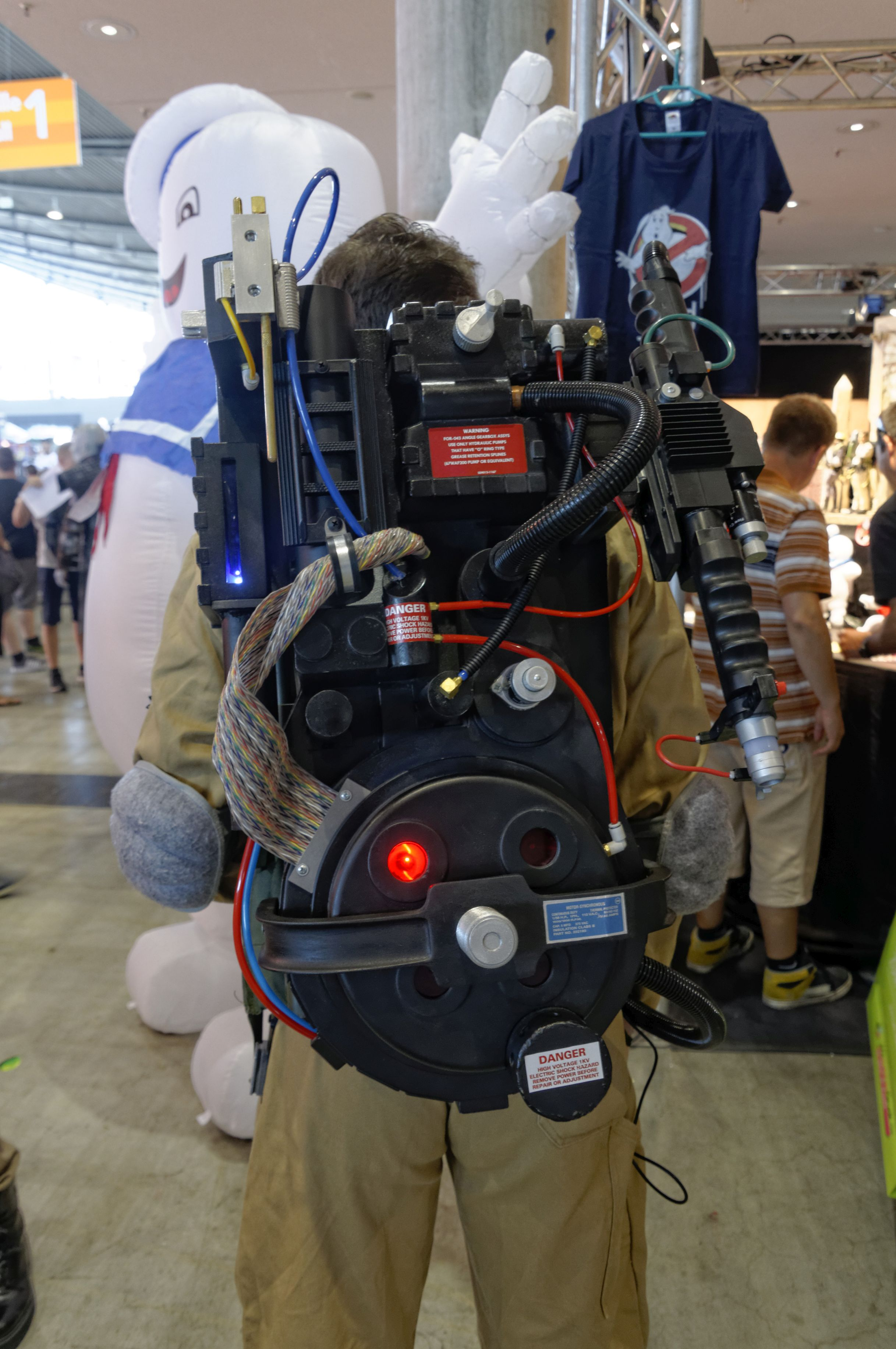 Bilder von der Comic Con Germany in Stuttgart 2018